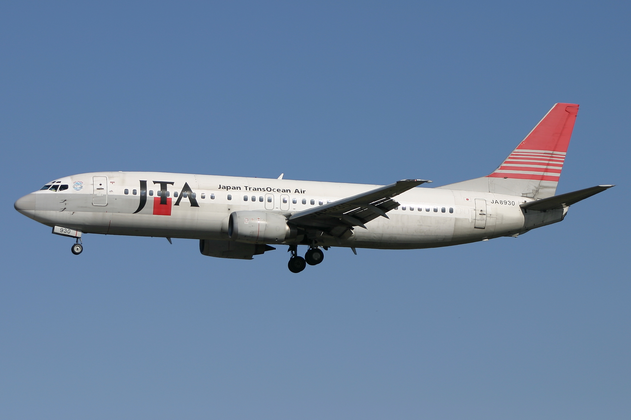 日本トランスオーシャン航空 ボーイング 737-4K5 JA8930 福岡空港